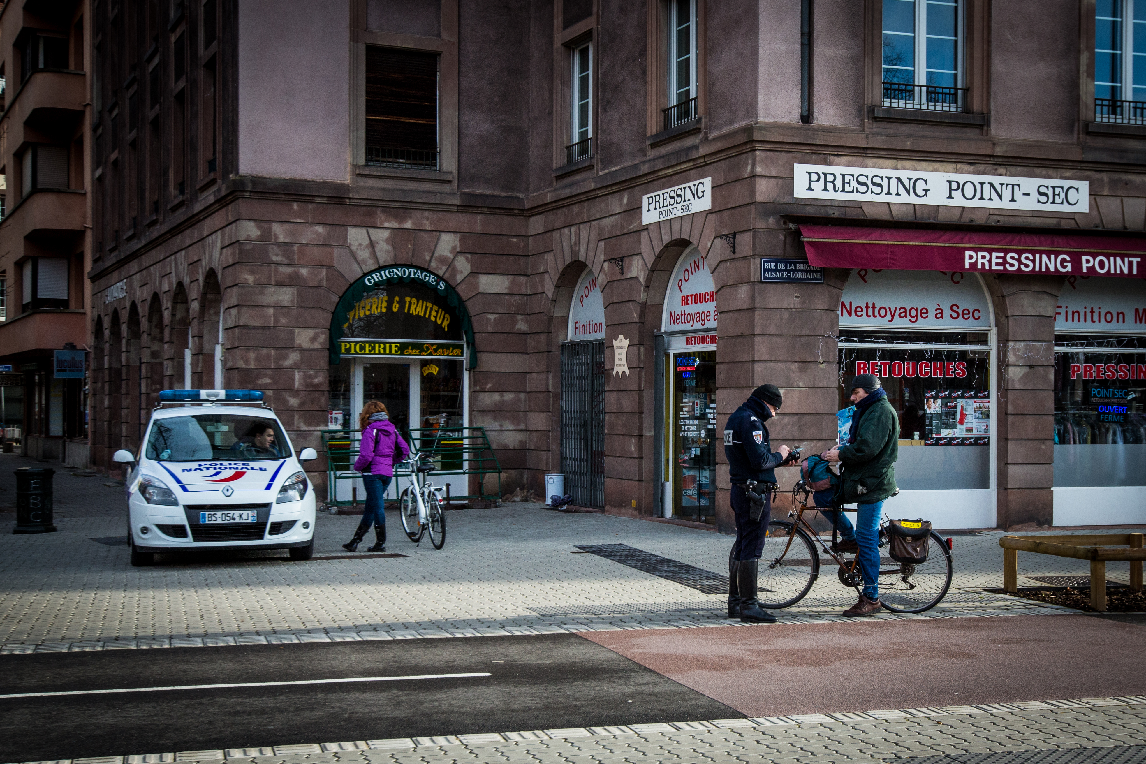 Verbalisation d’un cycliste place de la Bourse à Strasbourg en janvier 2015